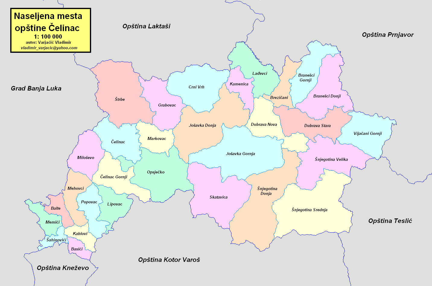 Opština Čelinac